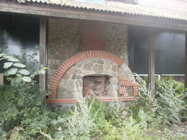 Adminhoone põhjakülg.